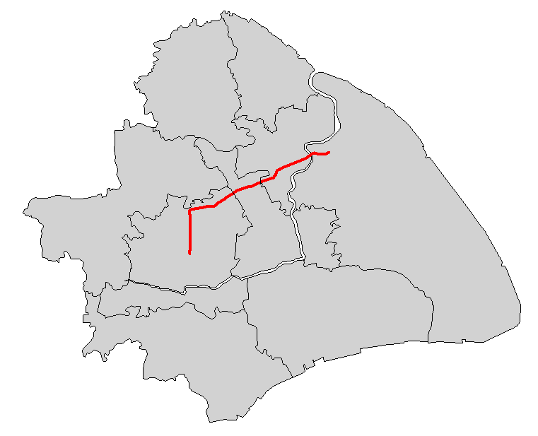 上海轨道交通9号线简图（2009年底） 本地图的底图不表示上海市全部所辖区域 因版面关系，上海市所辖之崇明岛、长兴岛等与本线路无关的离岛未在本图中表示。